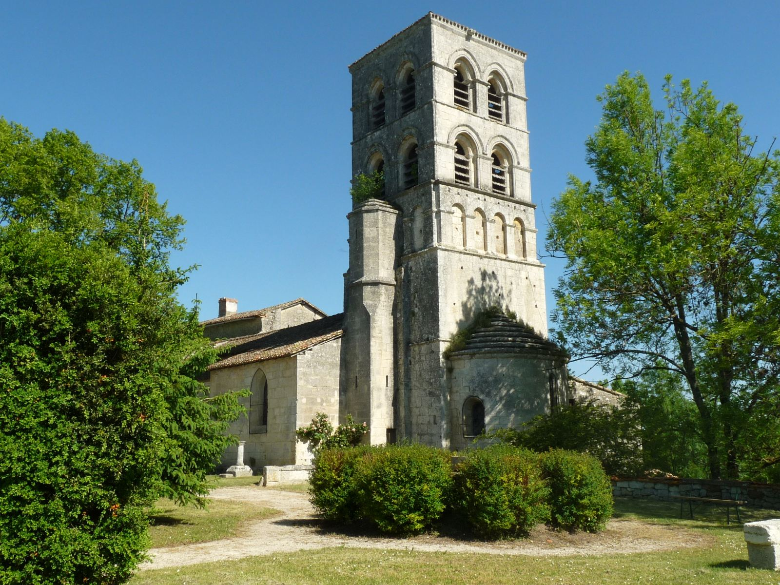 église de Sers, Charente, France